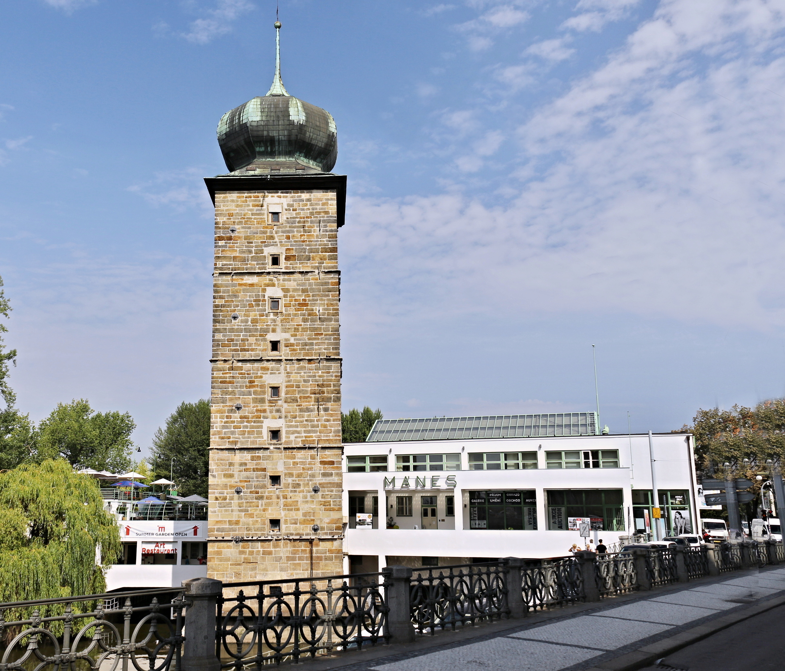 Galerie Mánes a Šítkovská věž